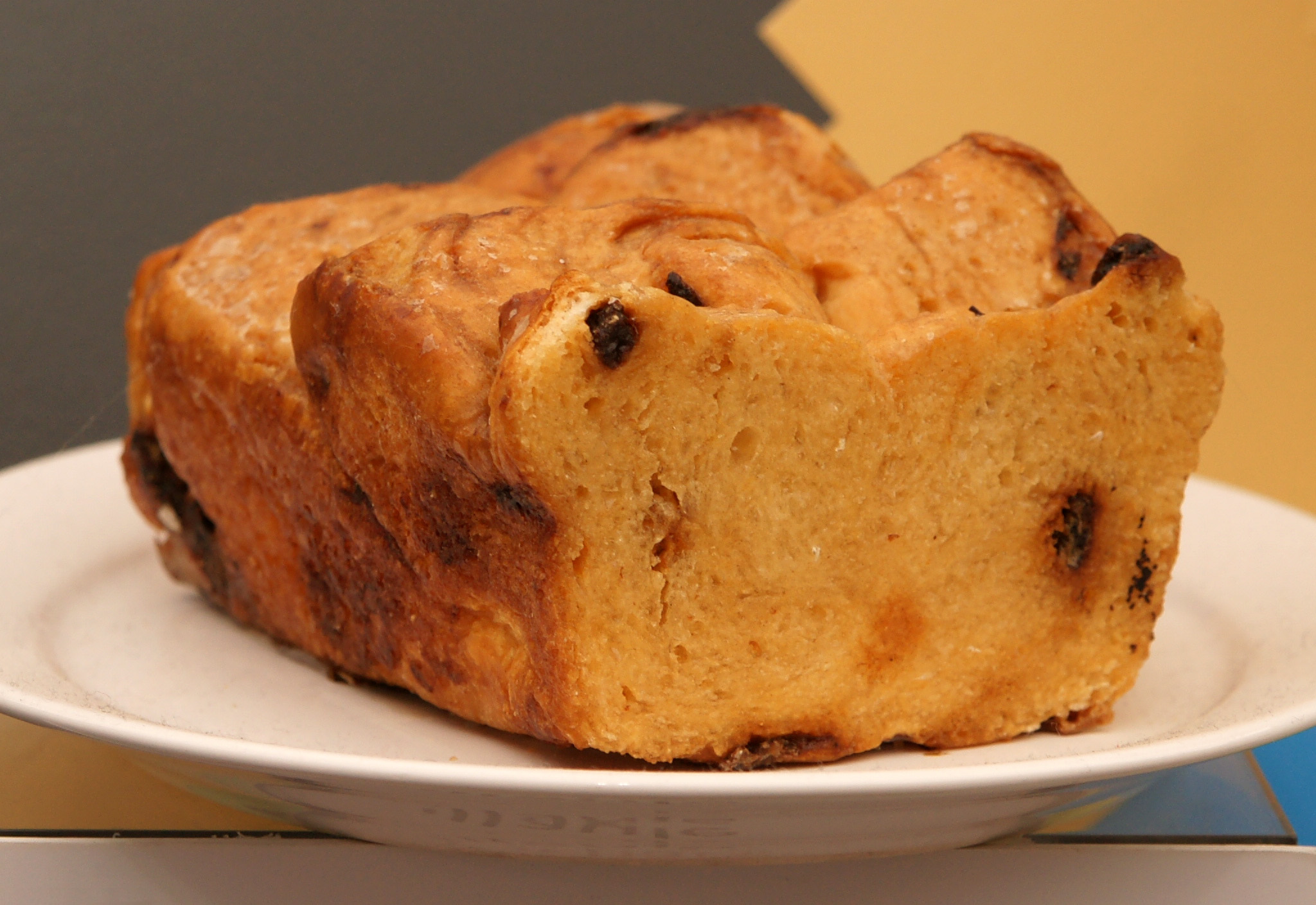 Taillaule neuchâteloise (Nachbildung, Bern BEA expo 2011)